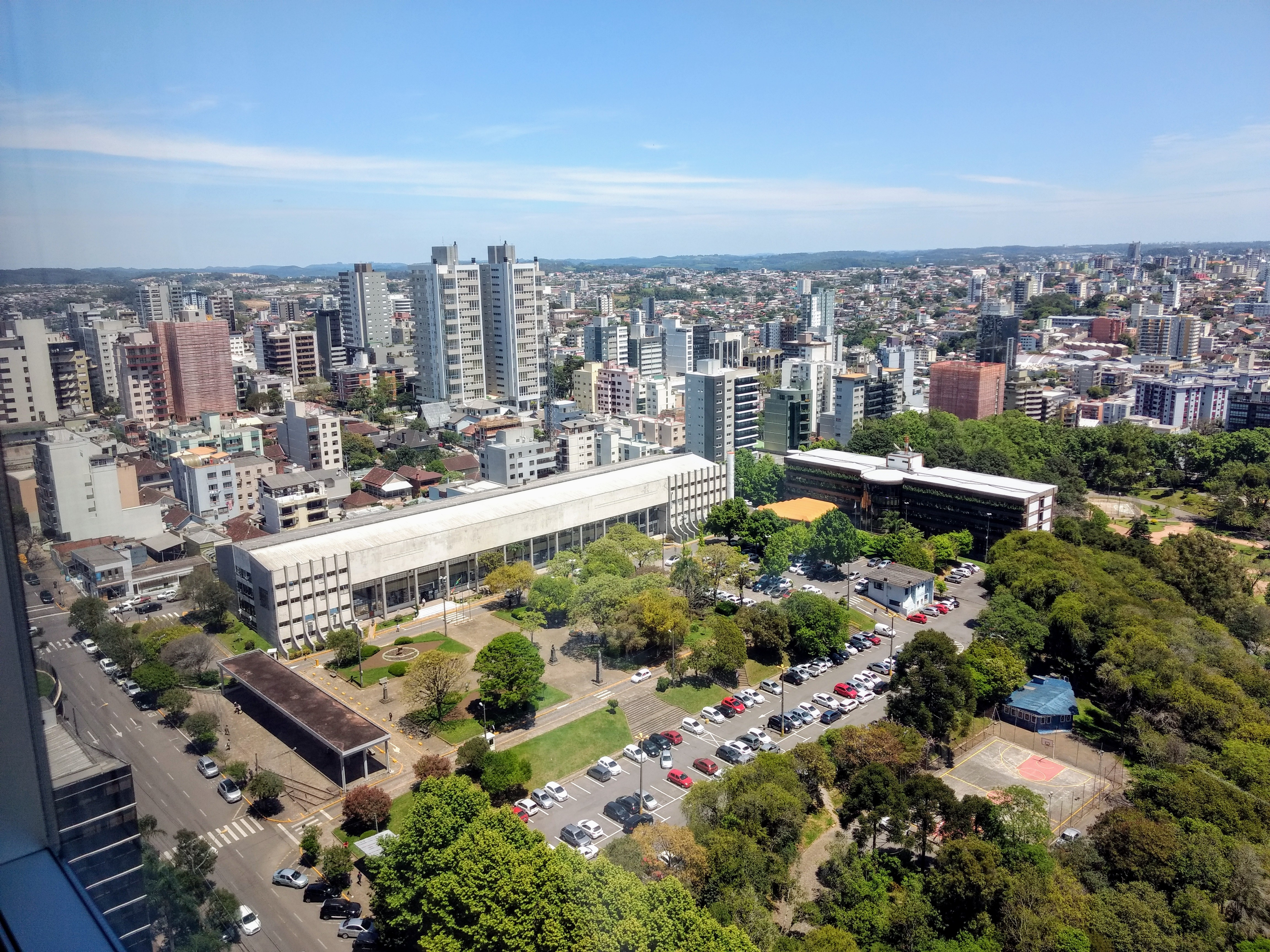 Vista aérea da prefeitura e câmara de vereadores. Bairro Panazzolo ao fundo